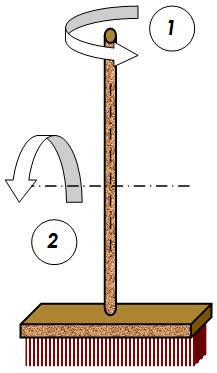 Inertie en rotation d'un balai de ménagère. Essayez de faire tourner un balai suivant les directions proposées et constatez la différence. Catégorie:schémas Catégorie:mécanique du solide